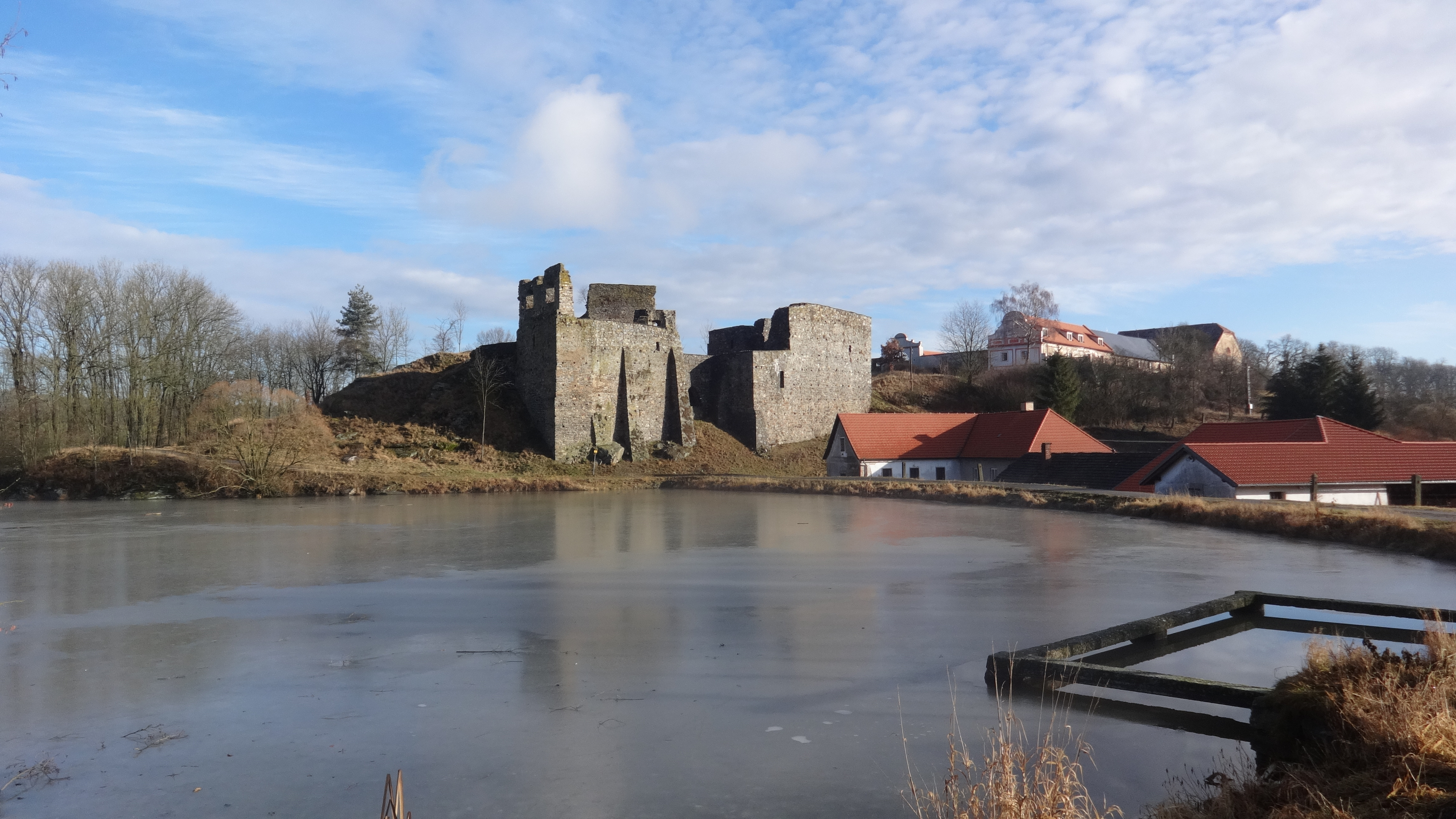 Hospodářský dvůr Starý zámek a zřícenina hradu Borotín